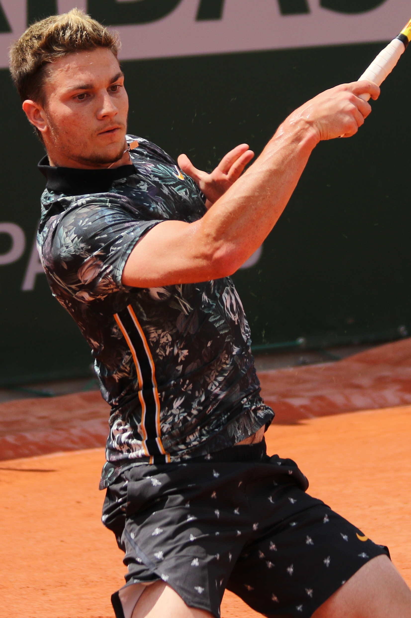 Kecmanovic RG19 (42)